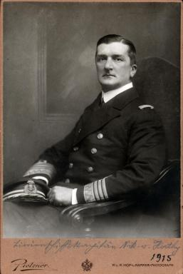 Retrato del almirante austrohúngaro Miklós Horthy alrededor de 1915